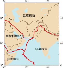 巴基斯坦板块图。